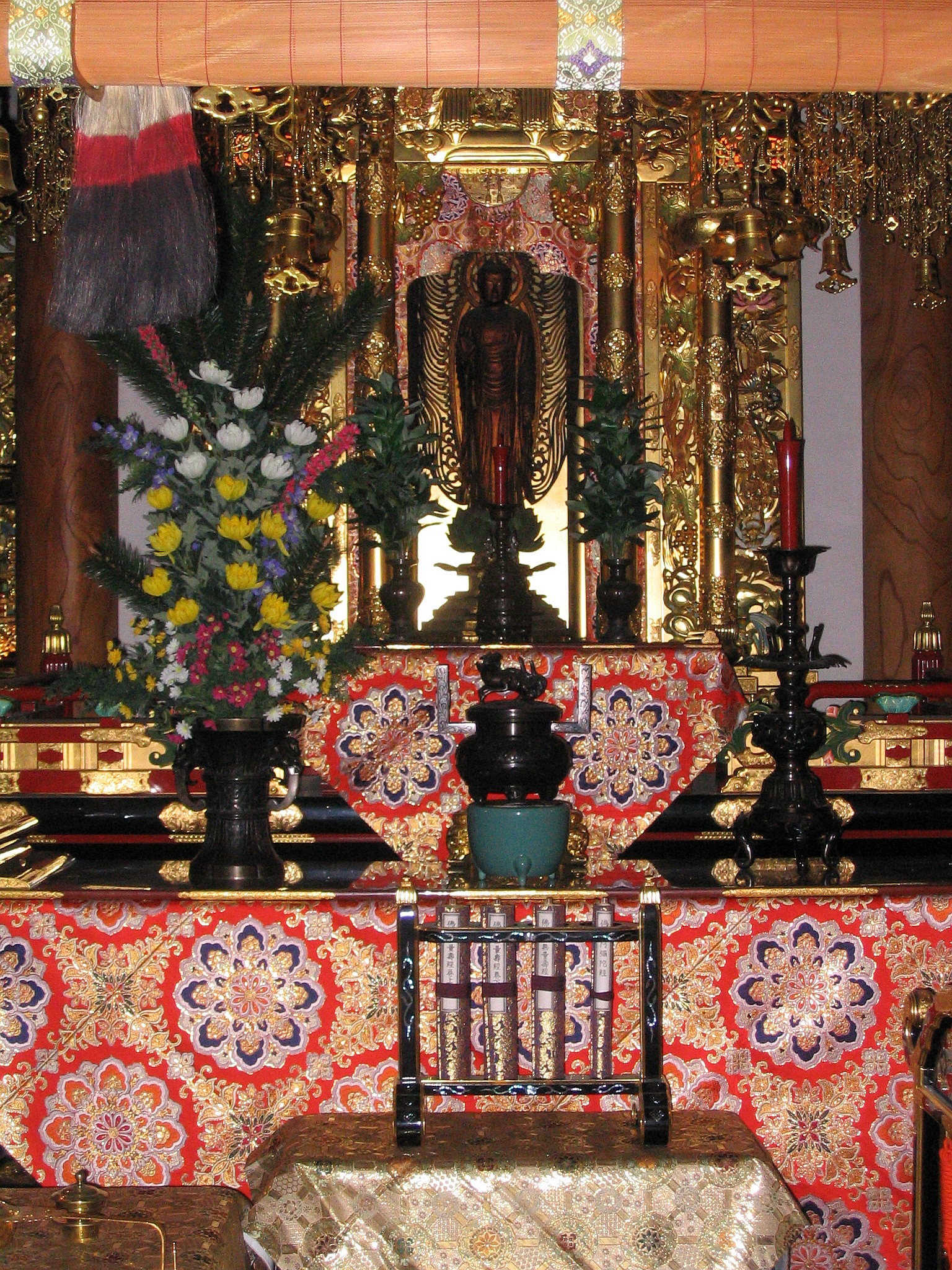 EKŌ-Haus, Düsseldorf-Oberkassel, Brüggener Weg 6. Der Grundstein wurde 1988 von Yehan Numata gelegt, dem Gründer der Gesellschaft Mitutoyo und der 'Society for Buddhist Understanding'. Zum EKŌ-Haus gehören ein buddhistischer Tempel, japanische Gärten, ein Haus in traditionellem Baustil mit einem Teeraum, im Souterrain des Hauptgebäudes ein Ausstellungs-und Vortragsraum, zwei Seminarräume sowie ein Saal für größere Veranstaltungen, und in einem zusätzlichen Gebäude, dem Kyōsei-kan, seit dem Jahre 1999 ein internationaler Kindergarten und eine öffentliche Bibliothek mit Archiv, Leseraum und Gästezimmern. (Von der Homepage des EKŌ-Hauses)